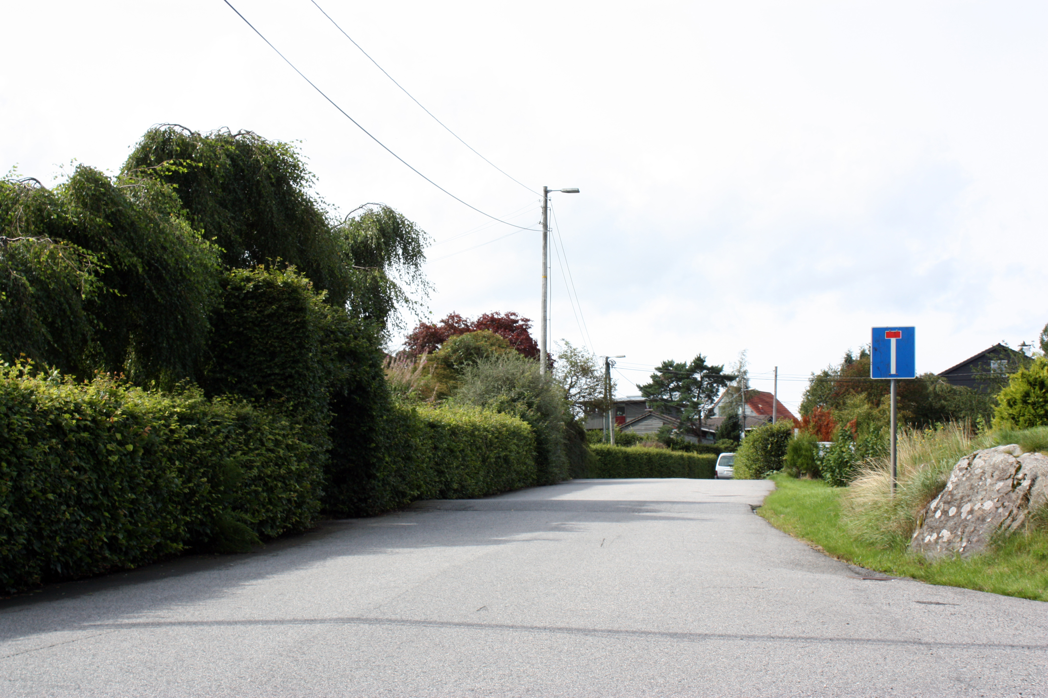 Bjørkåsen, Fana, Bergen. August 2009.